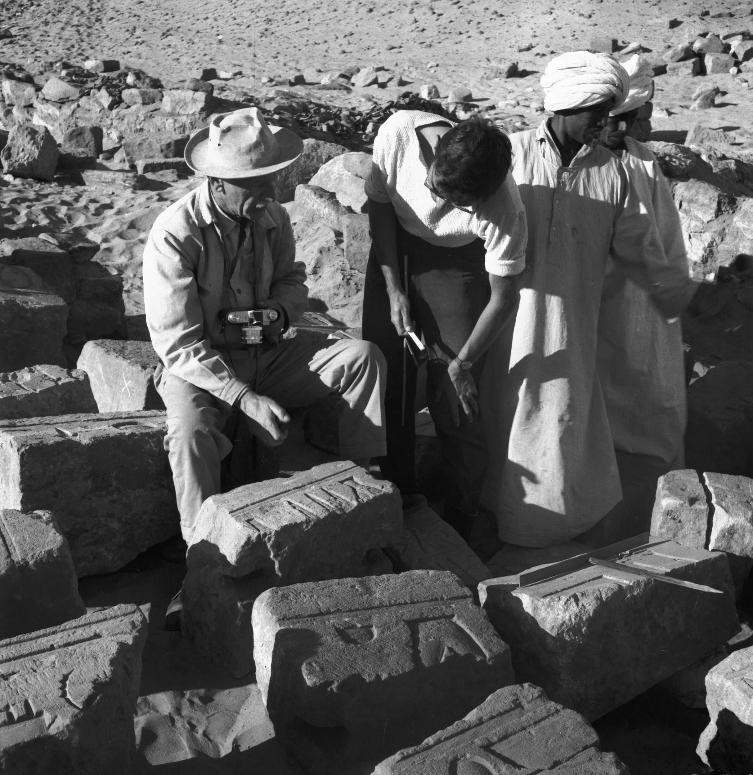 Wykopaliska w Faras. Na zdjęciu m.in. prof. Kazimierz Michałowski